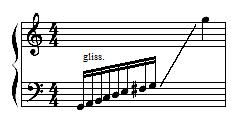 Ein Glissando in G-Dur